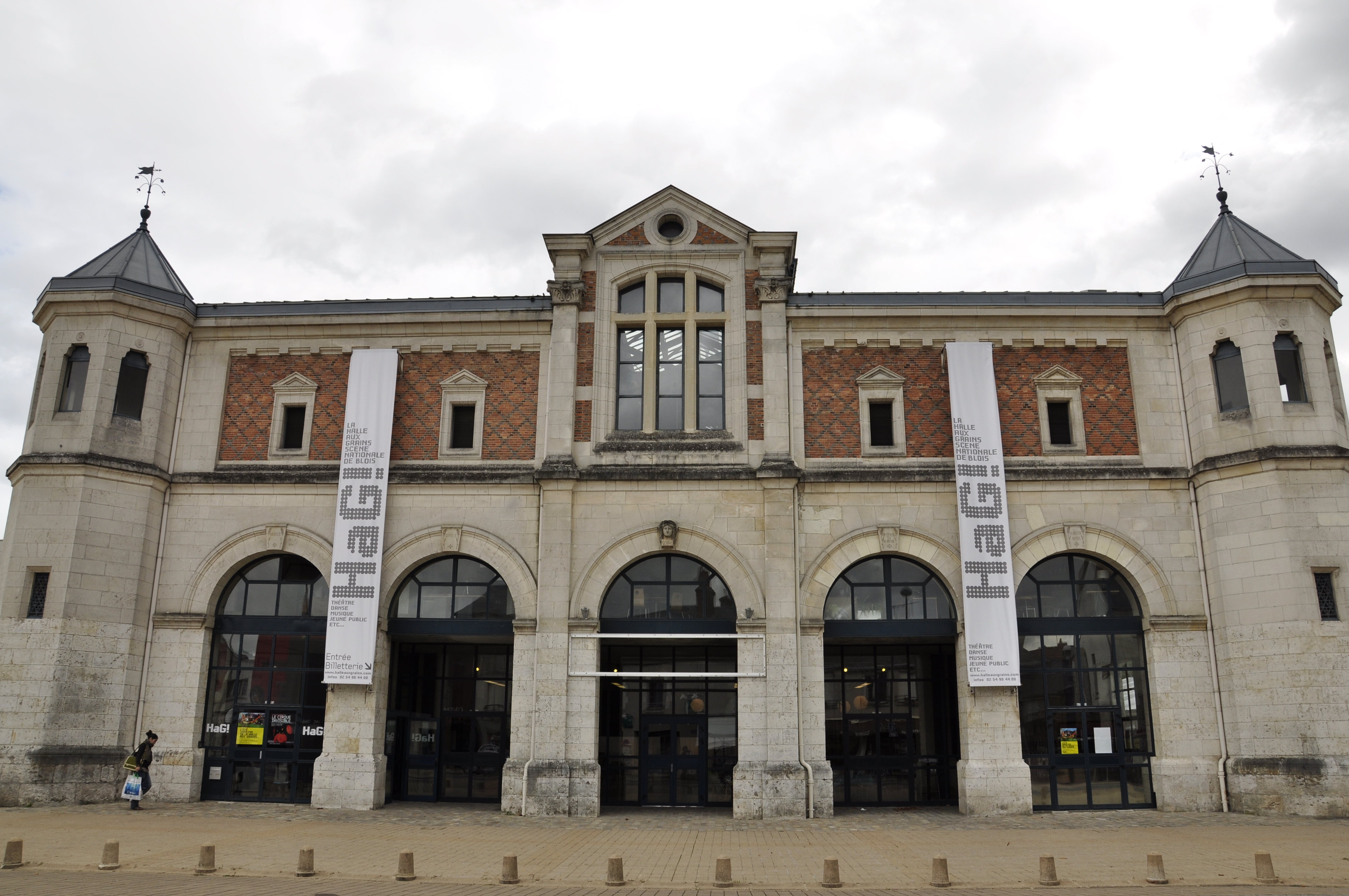 Halle aux grains de blois (41) .